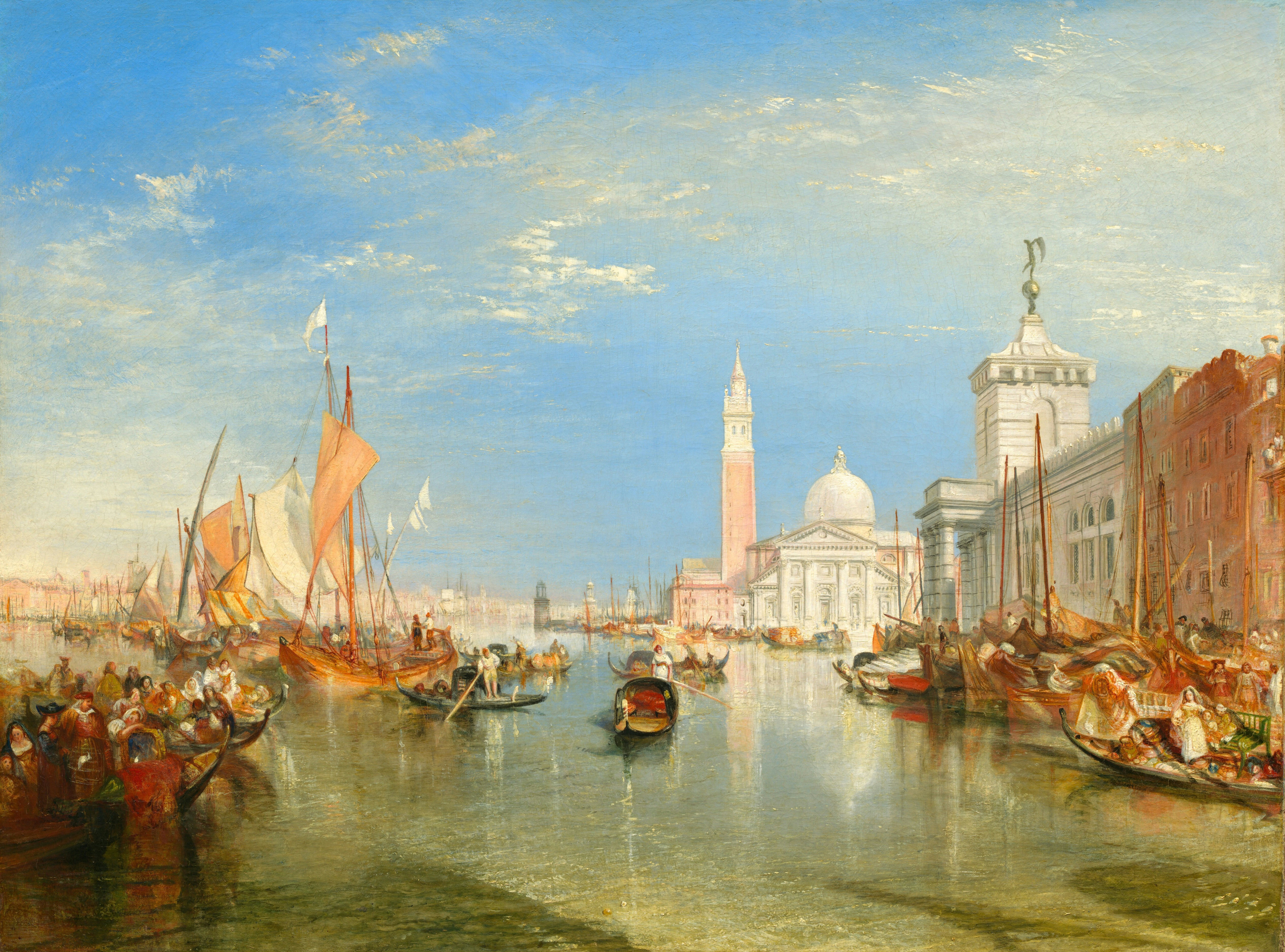 detail